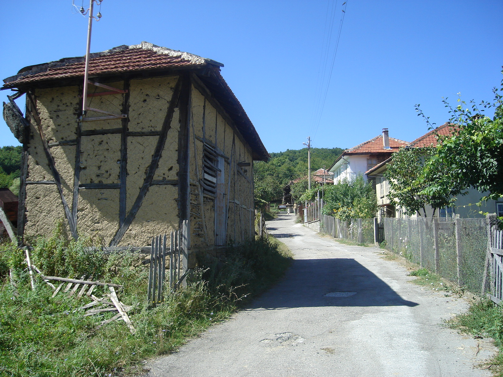 Изглед от с. Носеите